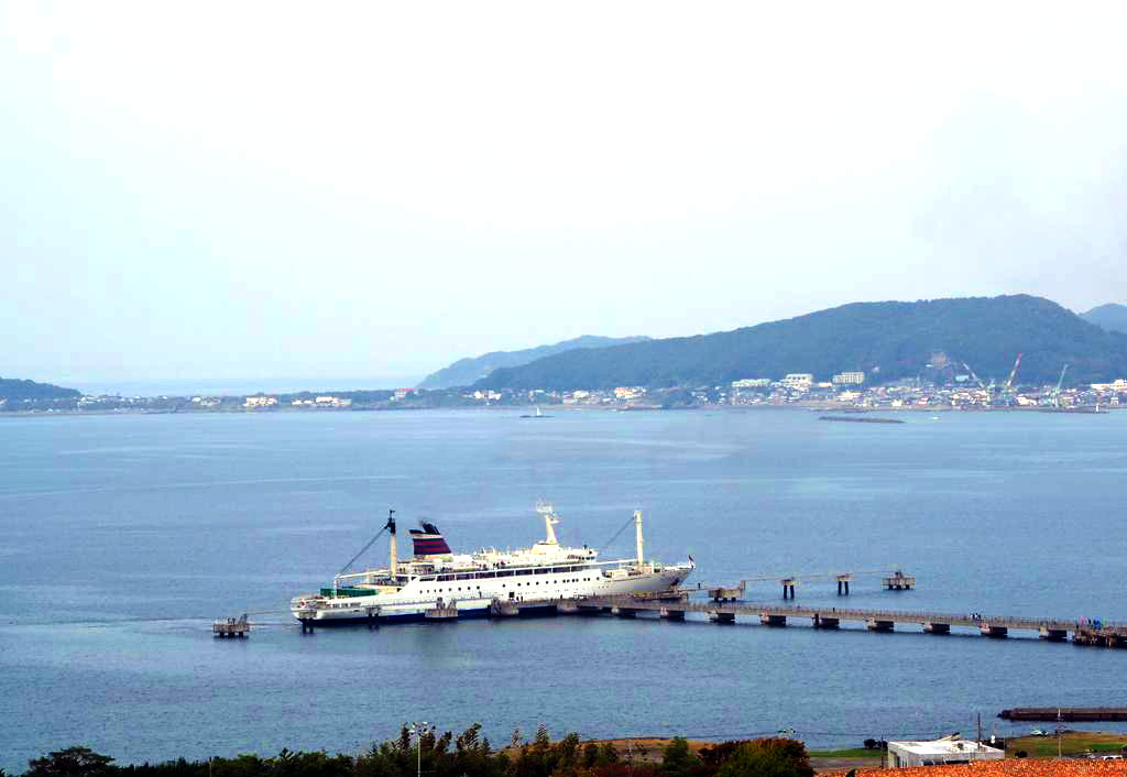 おがさわら丸停泊、館山港にて（2015年）